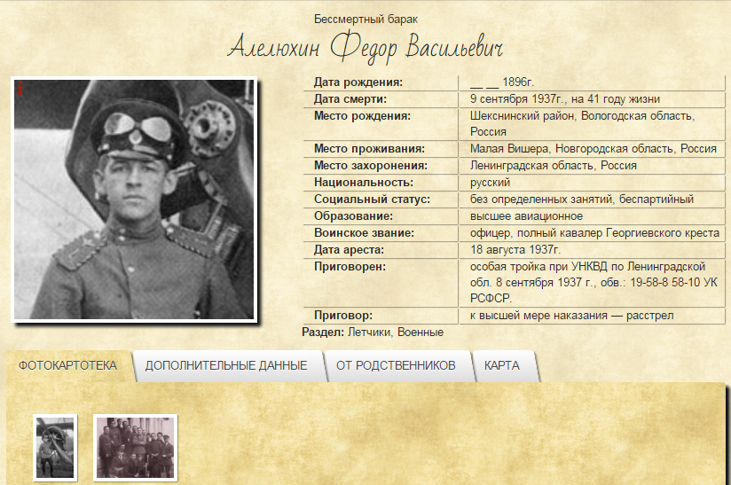 Одна из тысяч страниц сайта с личными данными о репрессированном.